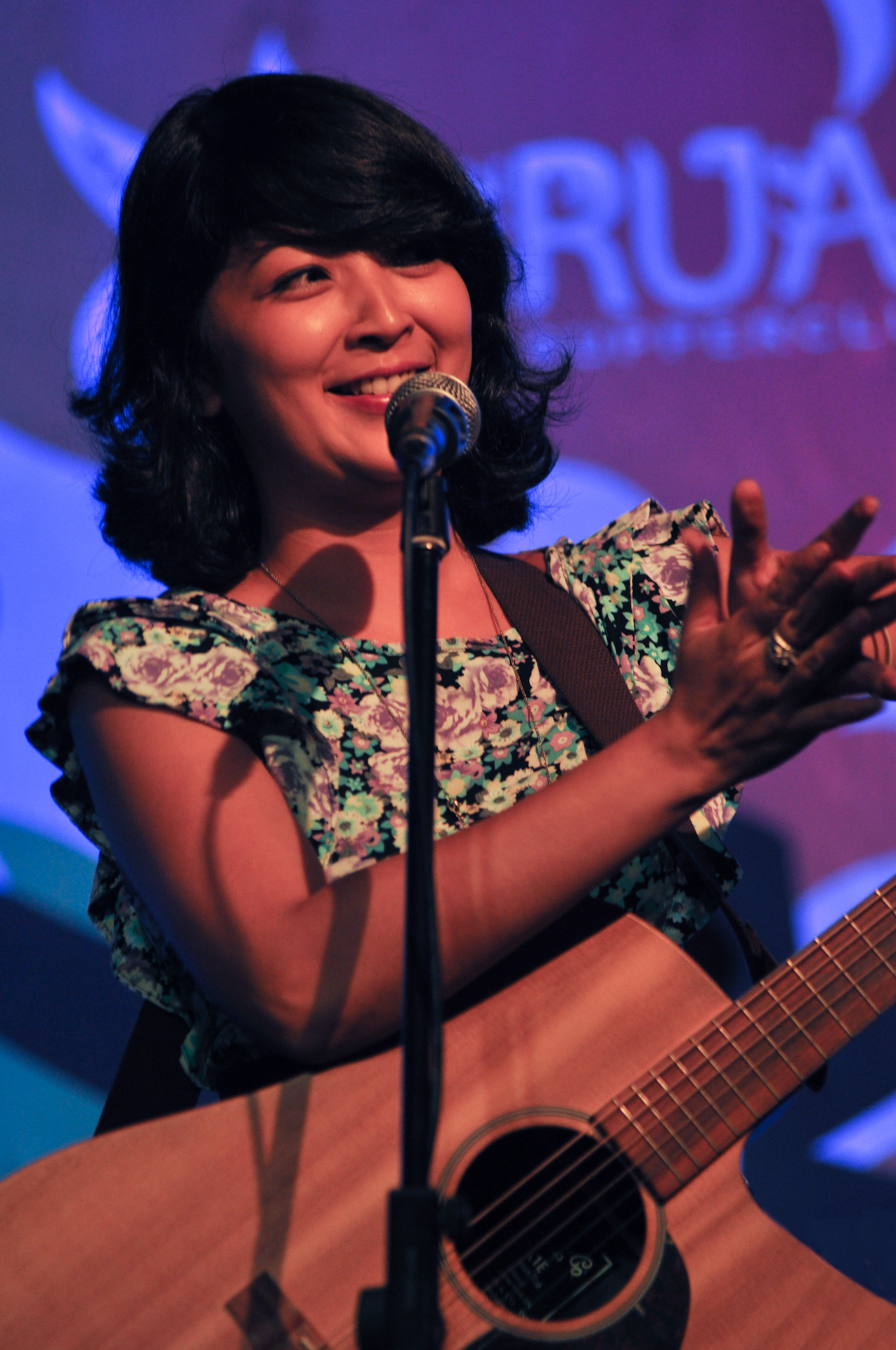 Liyana Fizi in 2010